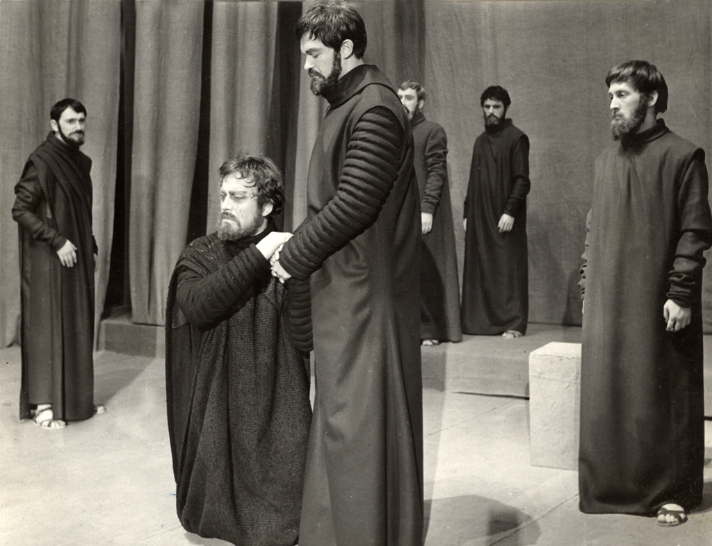 Sofokles, Kralj Oidipus, Slovensko ljudsko gledališče Celje. Na fotografiji: V ospredju Aleksander Krošl (Oidipus), Janez Bermež (Kreon), v ozadju Drago Kastelic, Borut Alujevič, Franci Gabrovšek (Zbor tebanskih starešin) in Brane Grubar (Vodja Zbora).